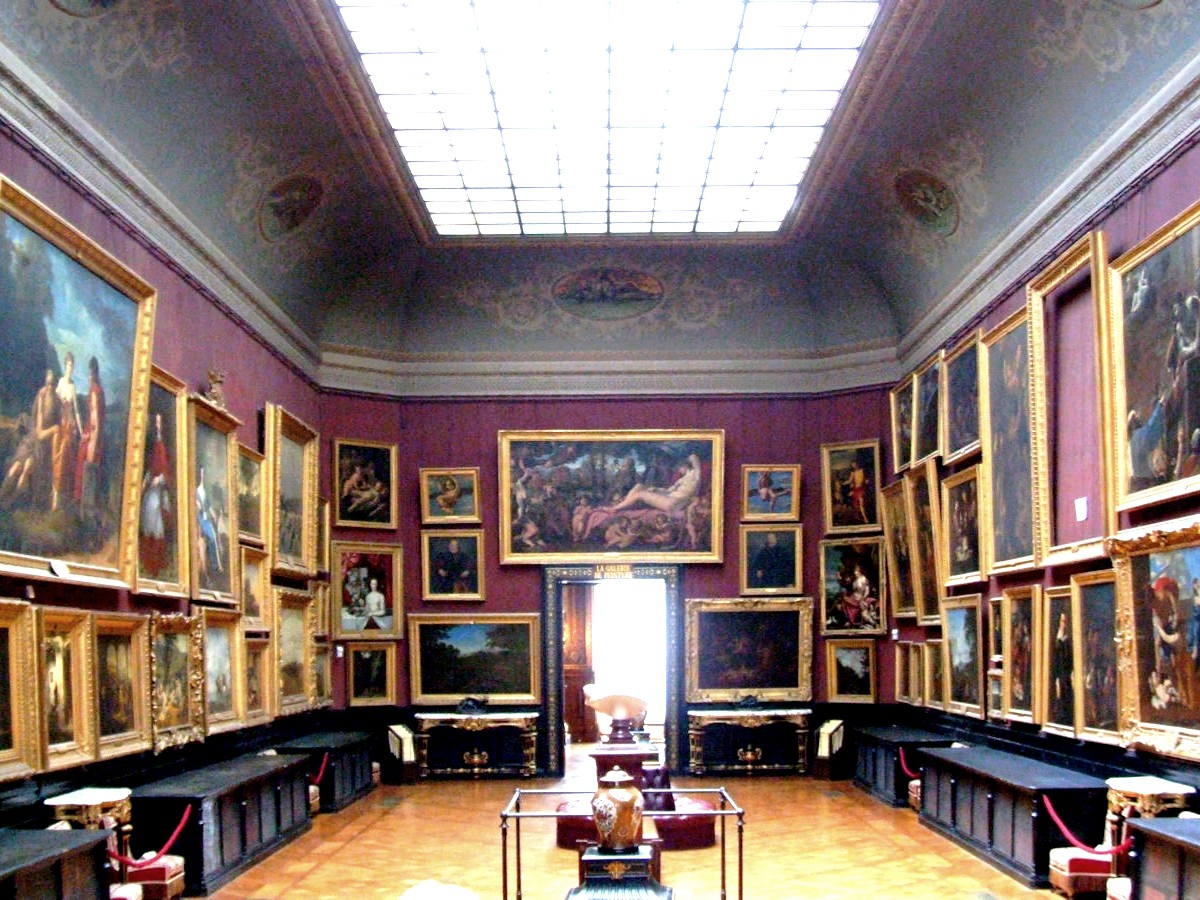 Château de Chantilly, La galerie de peinture, France